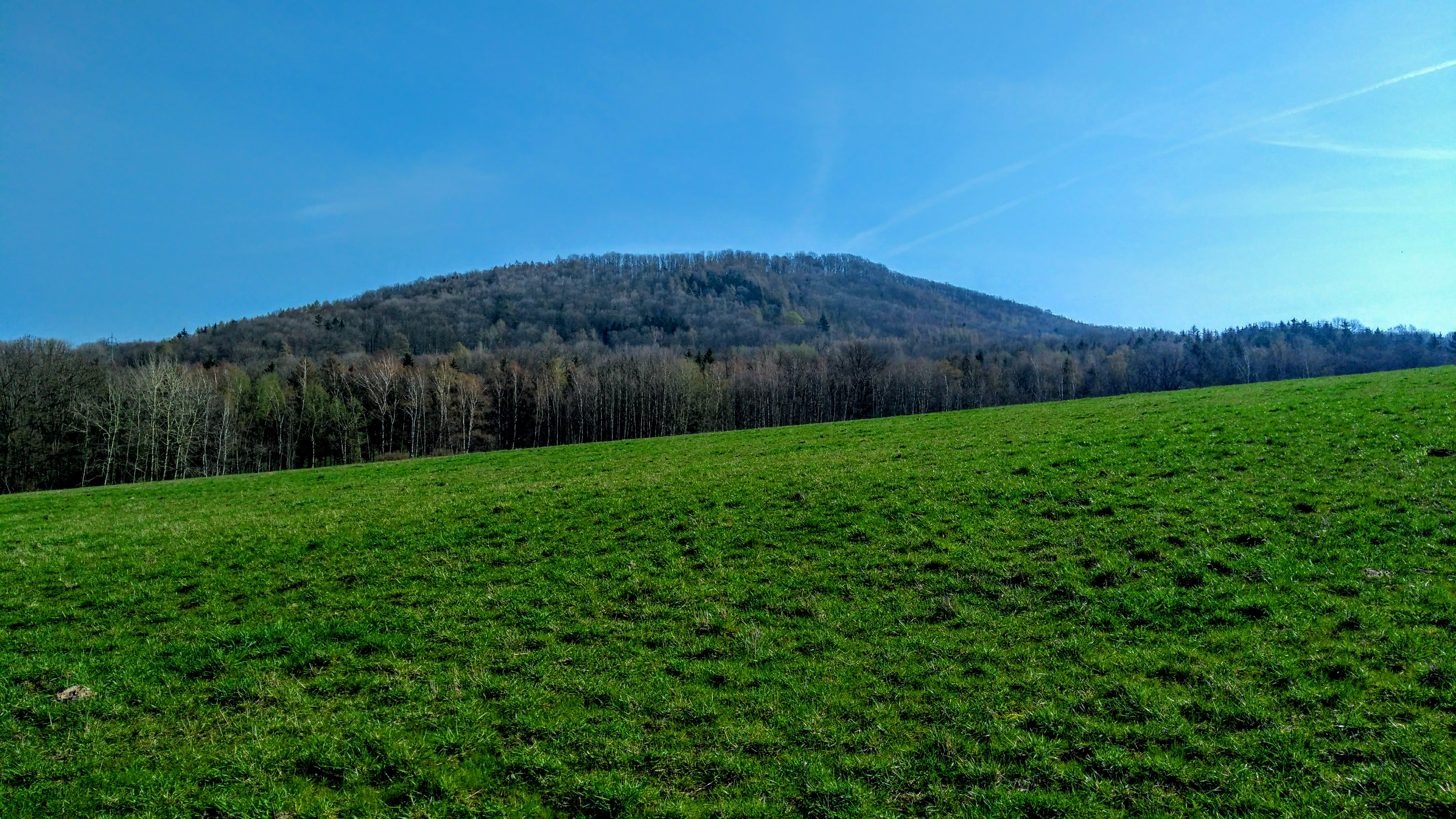 Popovičský vrch od Ludvíkovic.